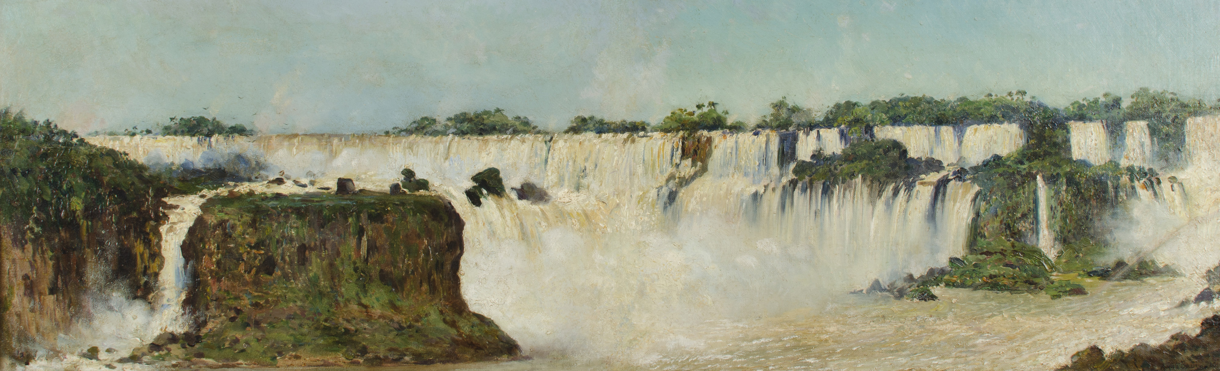 Augusto Ballerini, La cascada del Iguazú. 1892. 34,5 x 102 cm, con marco: 62 x 128,5 cm, óleo sobre tela sobre madera. Inv. 1846.